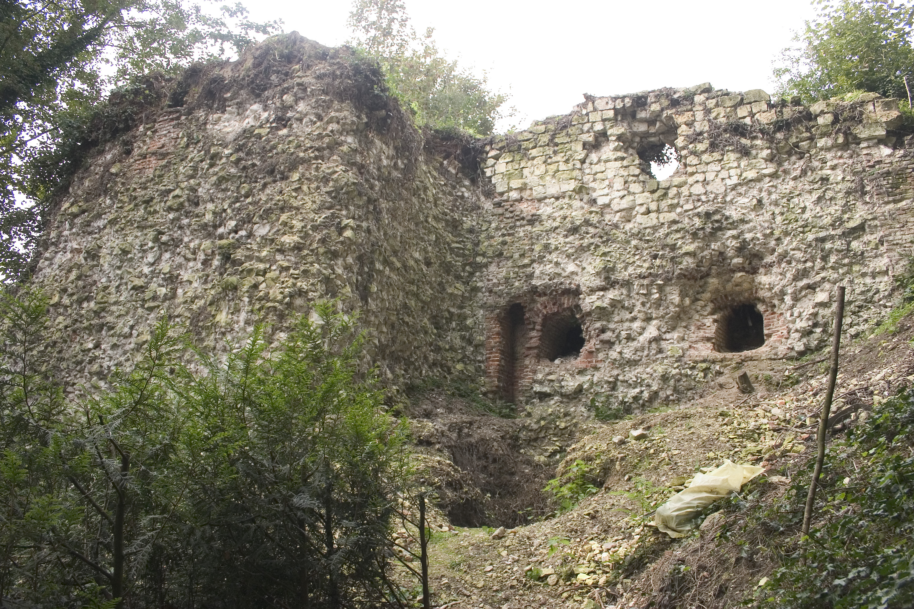 Bapaume le bastion du dauphin